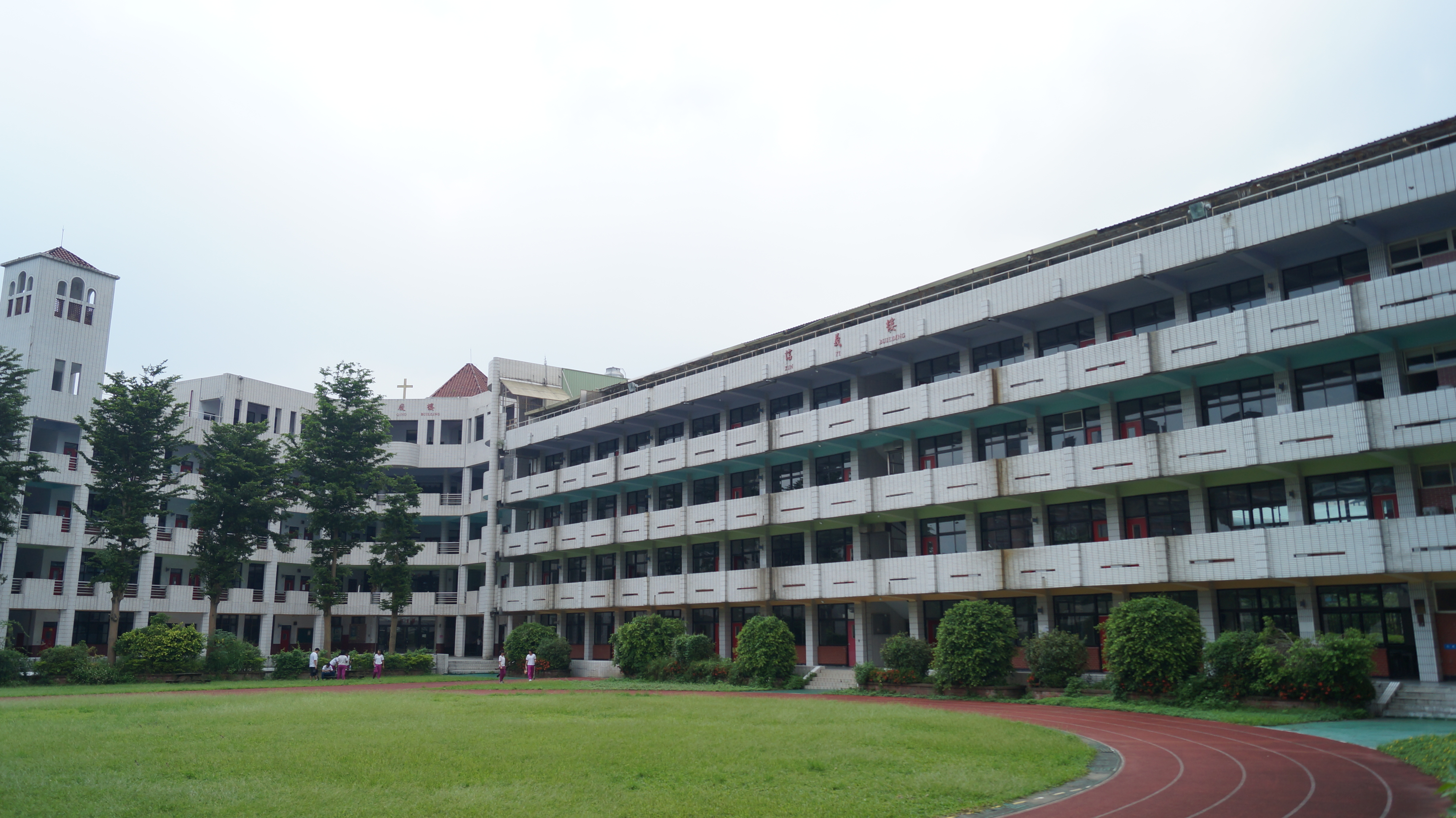 中文（台灣）: 滬江高中 信義樓與崧慶樓連接